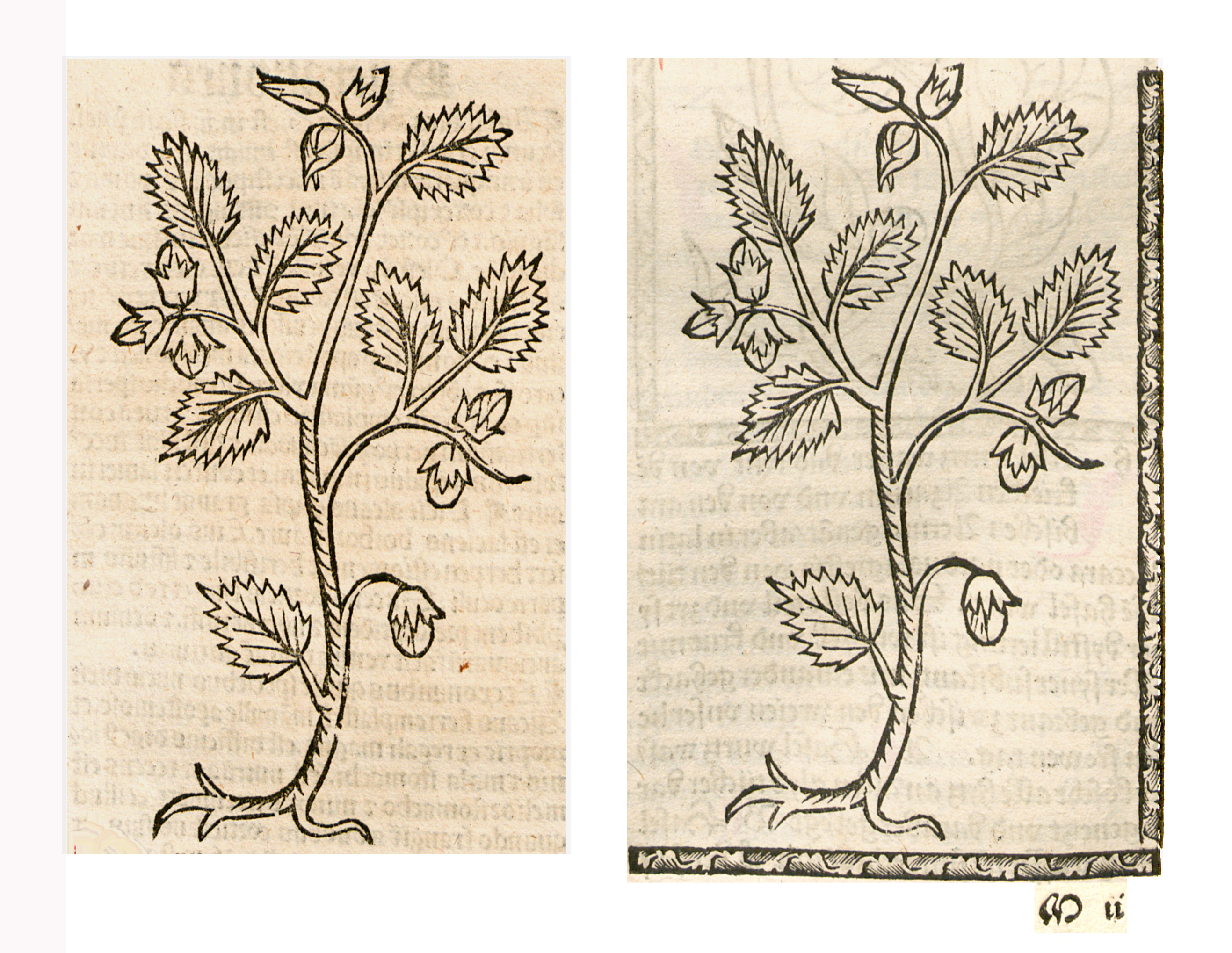 Abbildung von: Hasel Nuß (Corylus avellana)